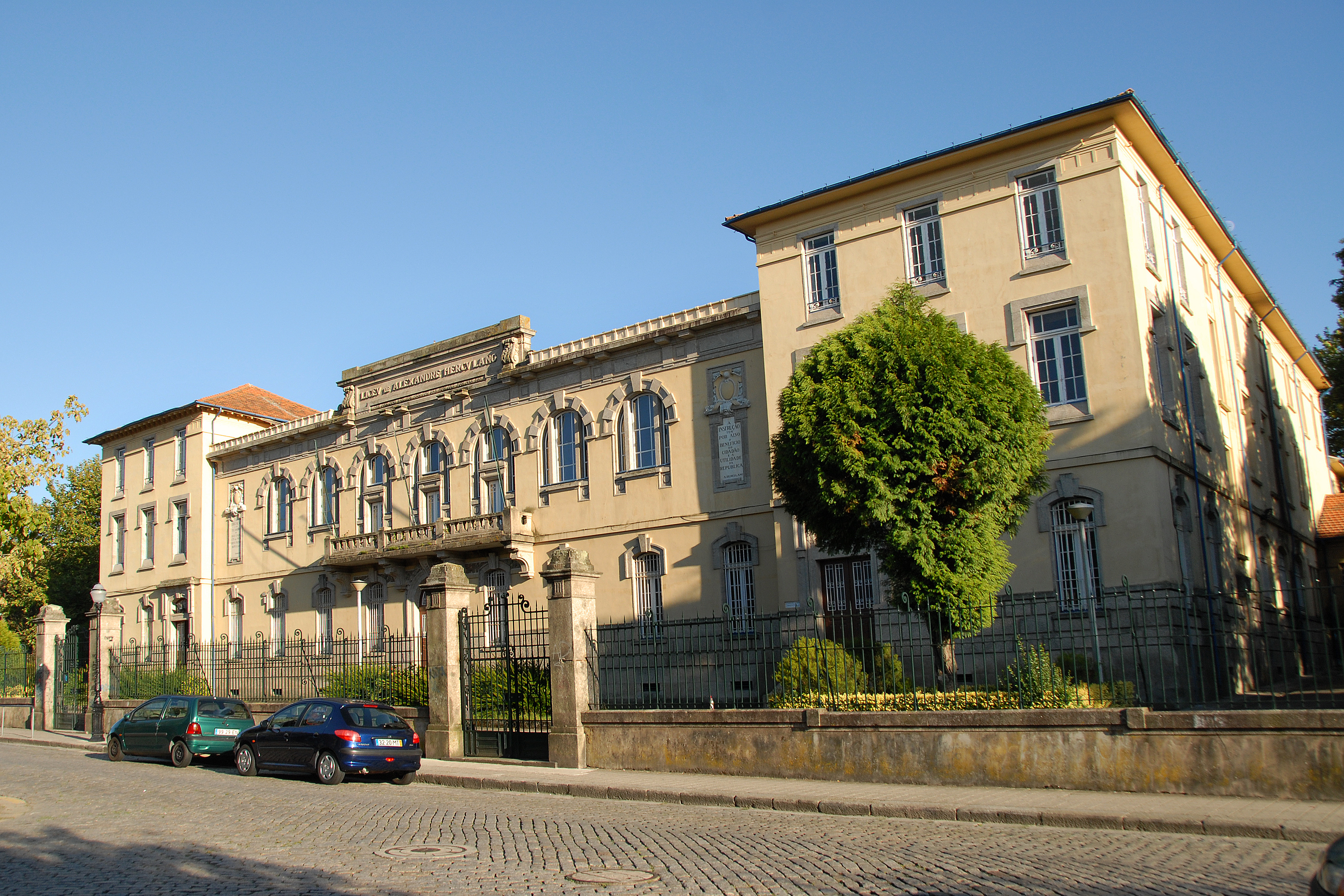 Liceu Alexandre Herculano This file was uploaded for Wiki Loves Monuments in Portugal with the unique identifier 6853117.